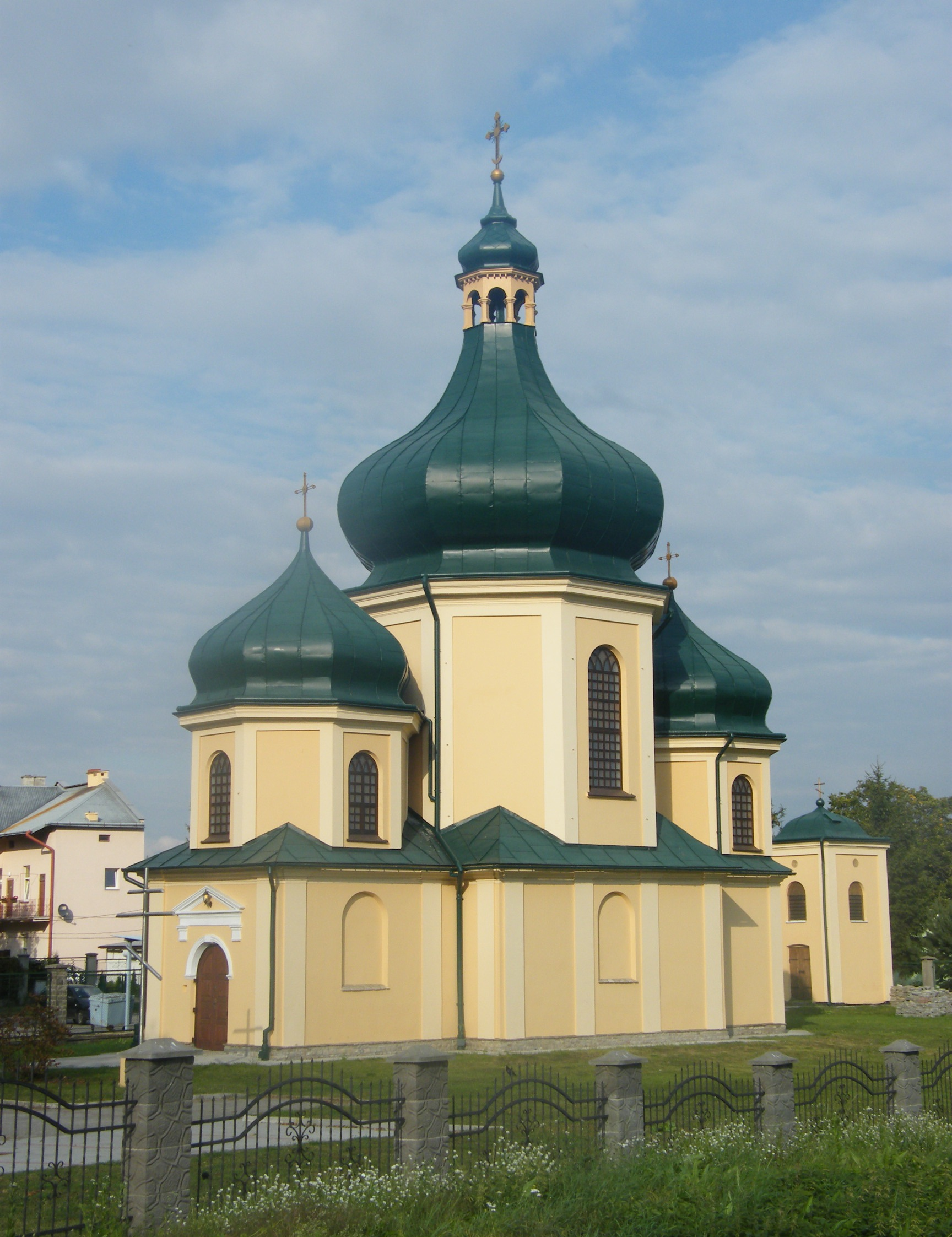 Cerkiew pod wezwaniem Narodzenia Przenajświętszej Bogurodzicy cerkiew prawosławna, dawniej greckokatolicka murowana, zbudowana w 1880 r. 06.1983.